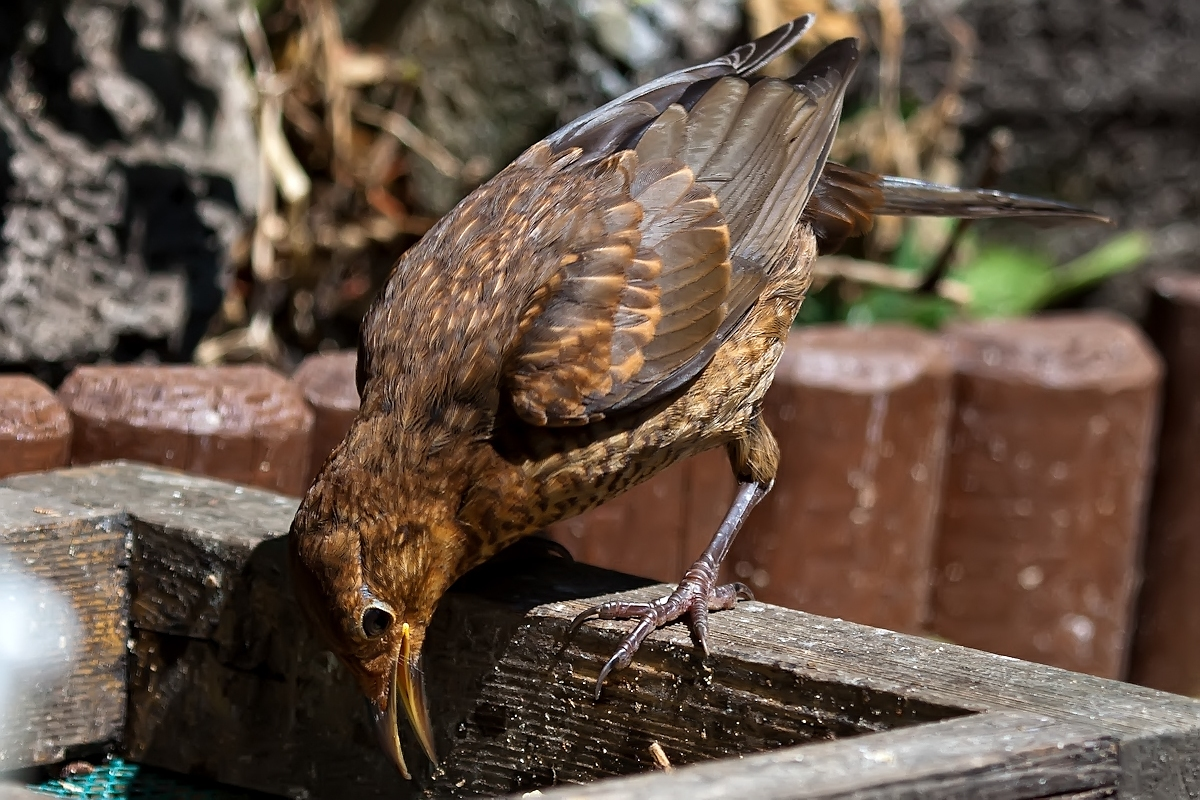 Turdus merula in Yeadon